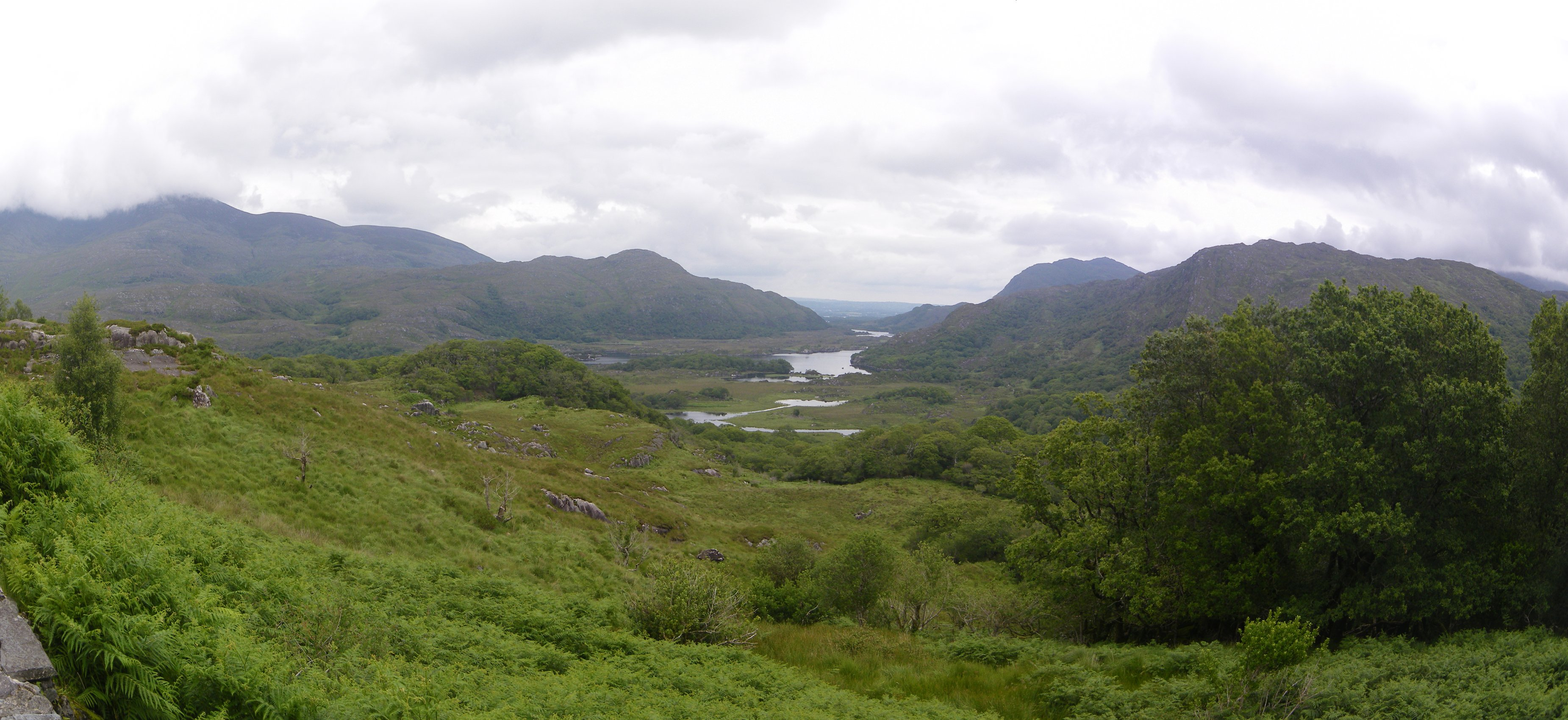 Panorama depuis Ladies View, sur les lacs de Killarney, Irelande